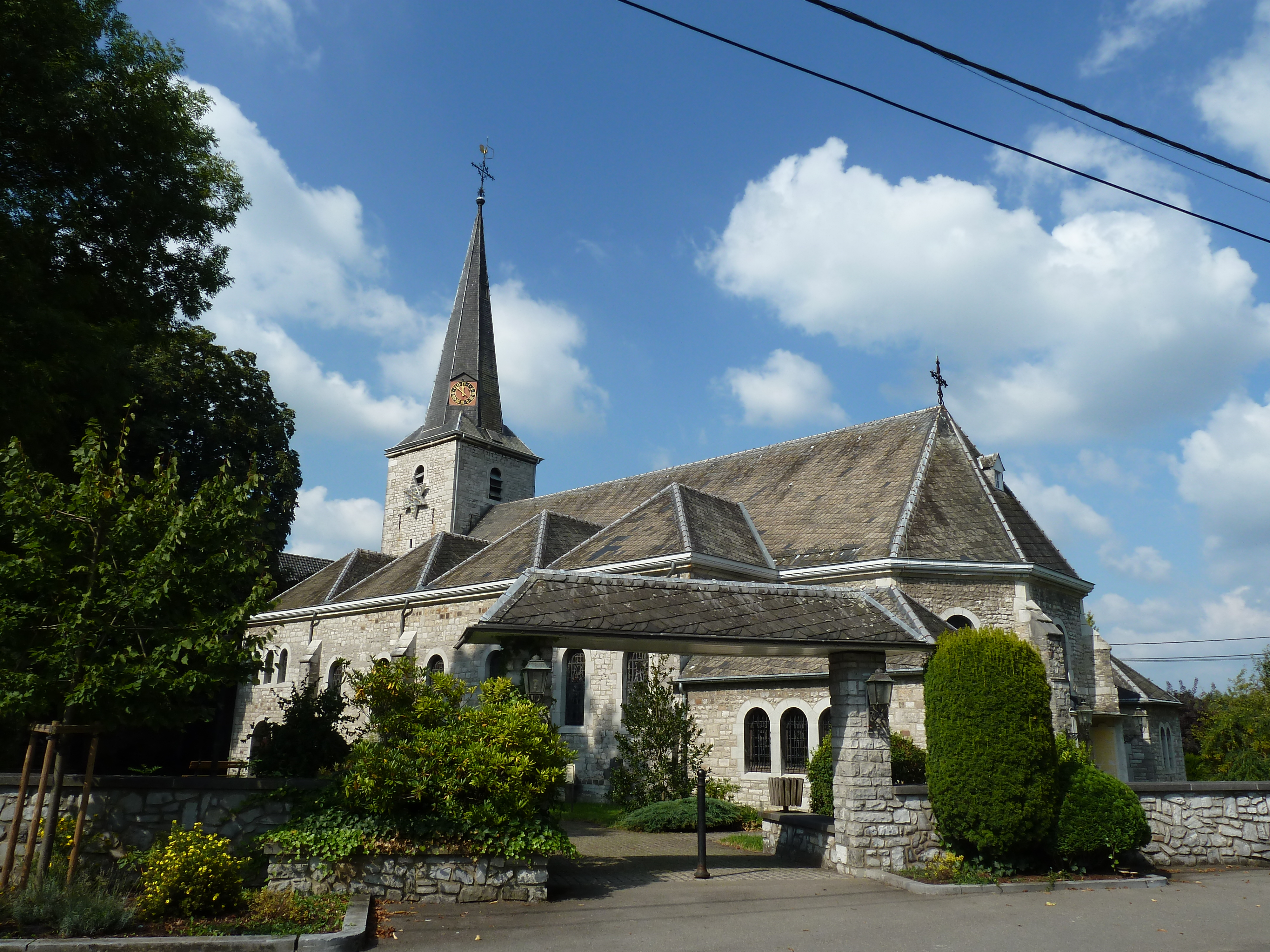 Dorpscentrum Eynatten, Raeren, België